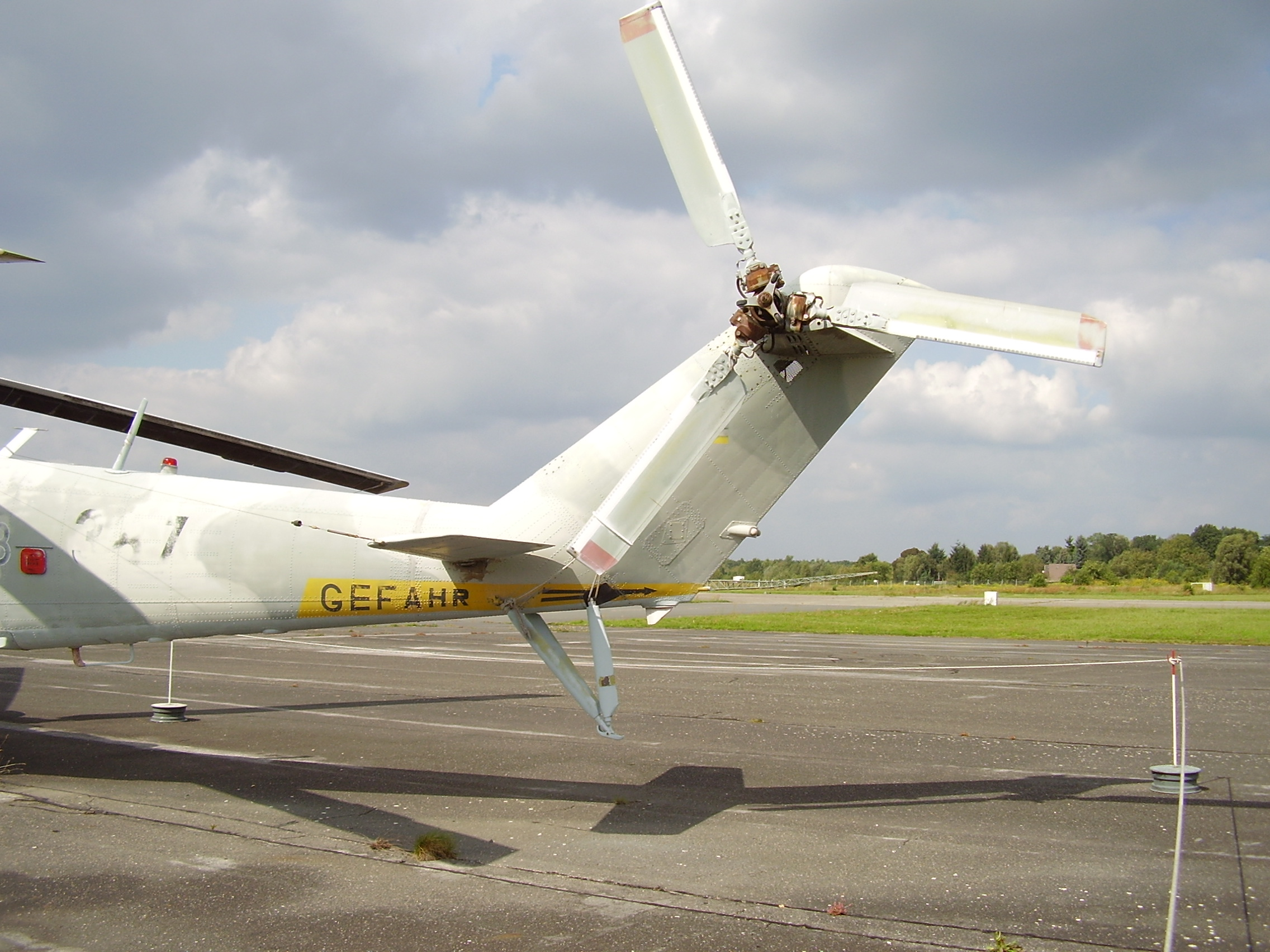 Luftwaffenmuseum der Bundeswehr; Airforce Museum of the Bundeswehr; Berlin-Gatow, Mi-24P